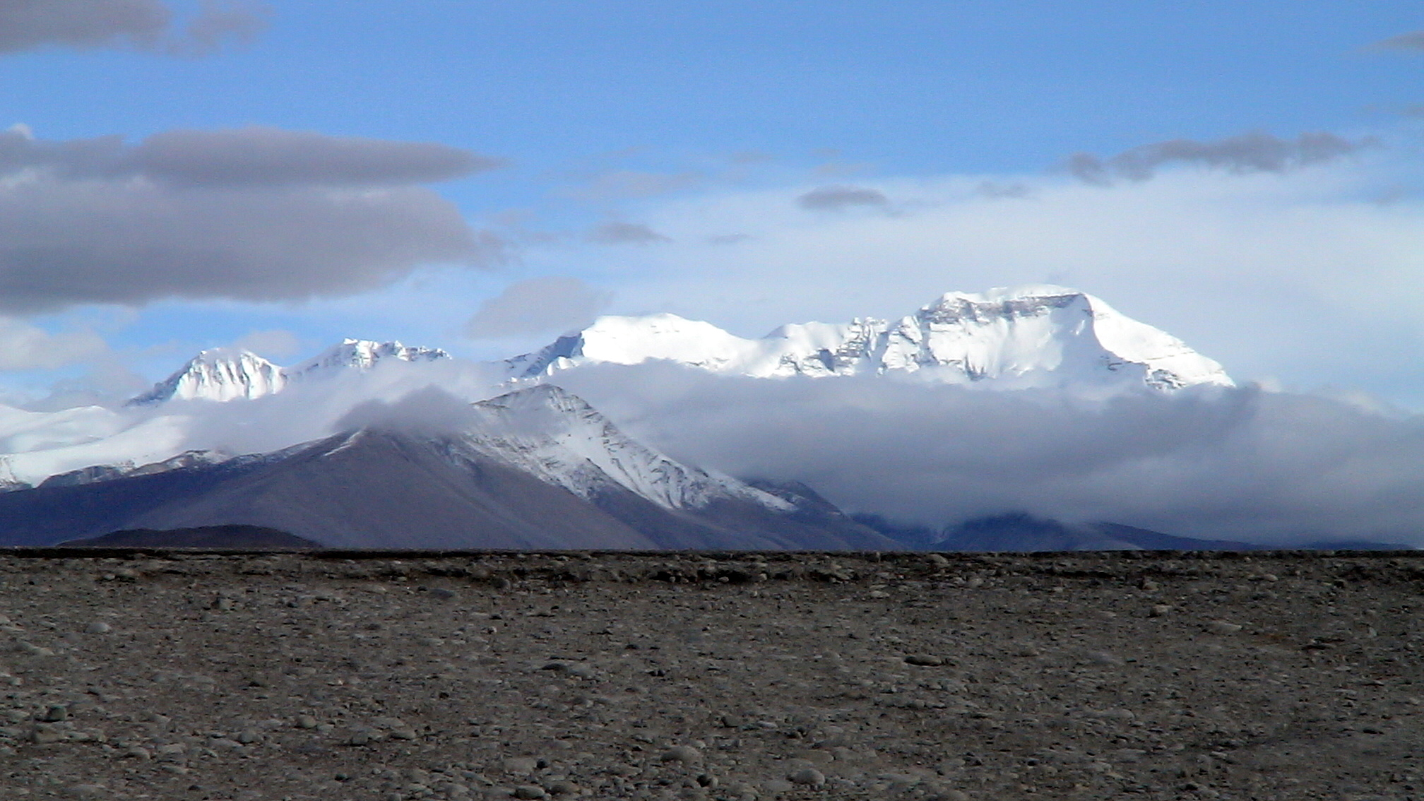 Blick von Tingri